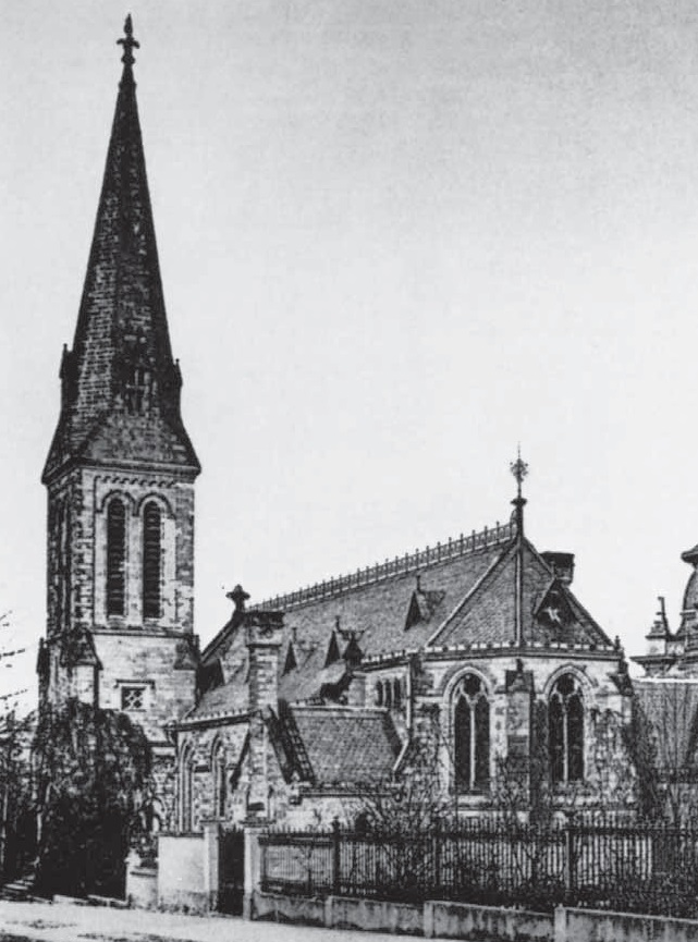 Dresden, ehem. US-amerikanische Episkopalkirche St. John's am Reichsplatz/Bergstraße.